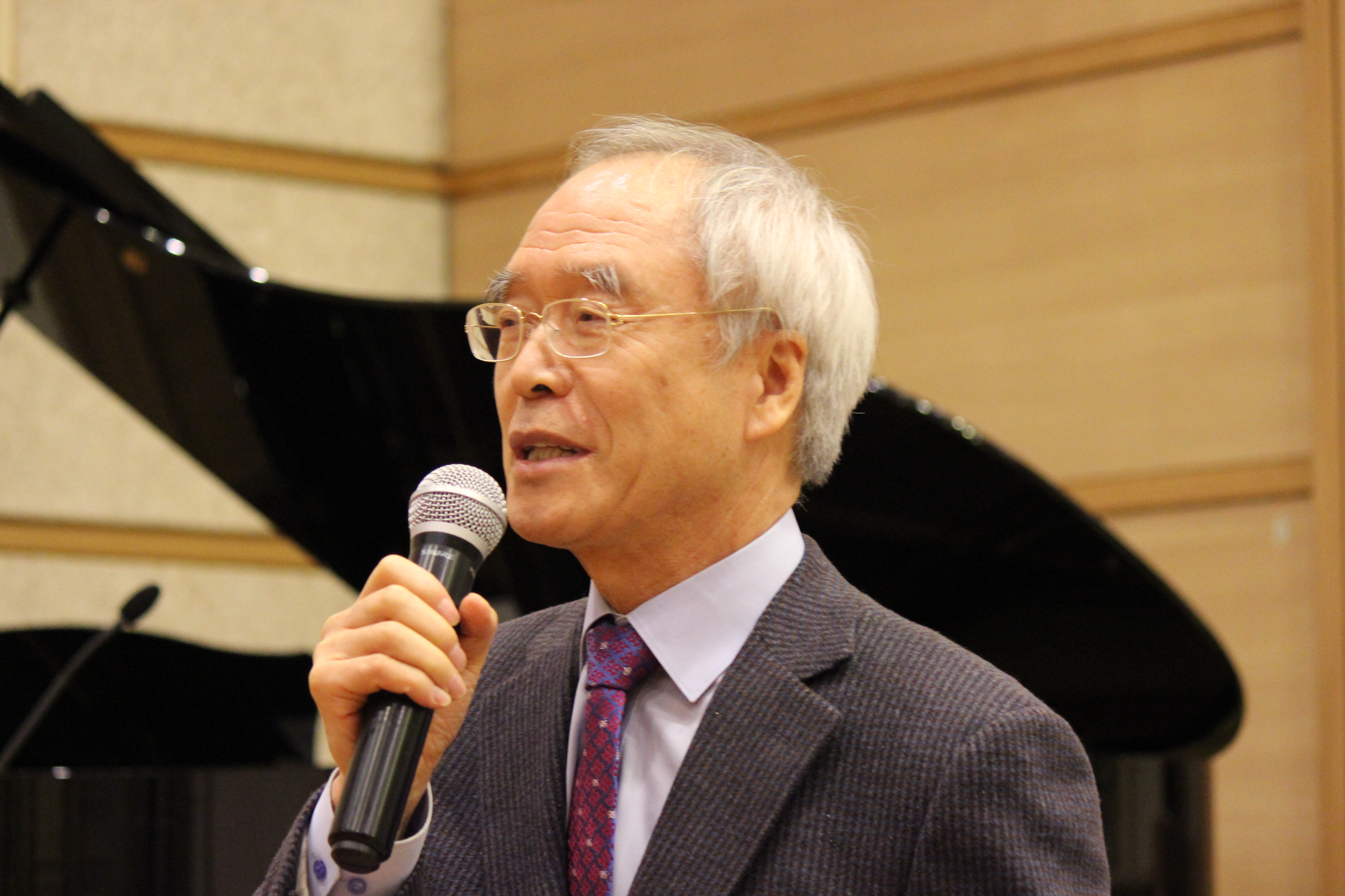 이상규 박사 한국장로교신학회 모임 2015년 11월 21일